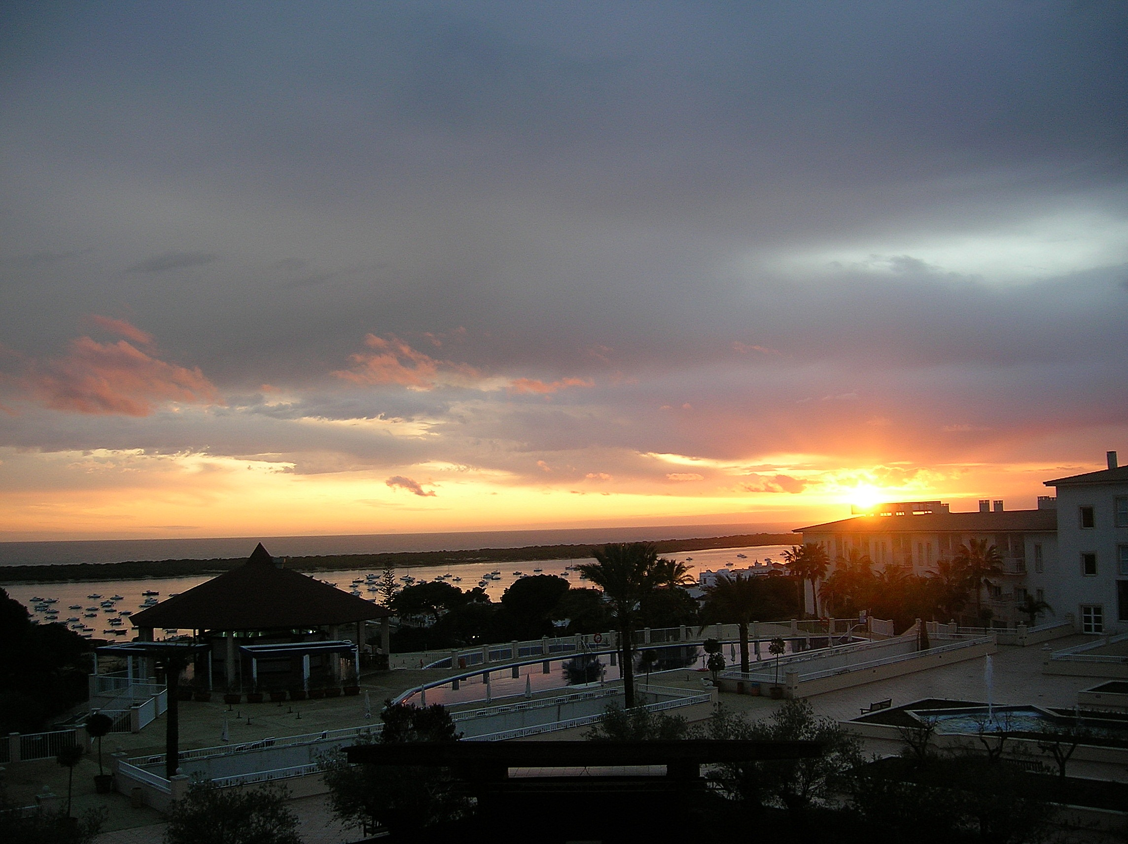 Puesta de sol en una tarde invernal